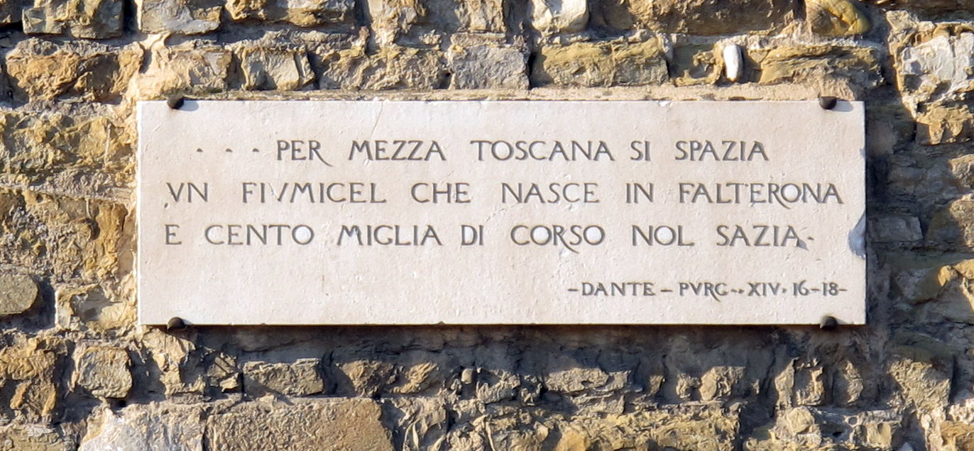 Viale Amendola, Firenze